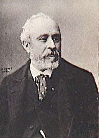 Artistphoto réalisée par Pierre Petit (1831-1909)TitleLouis Ernest Barrias, sculpteur (1841-1905)Current location Musée d'Orsay Native nameMusée d'OrsayLocationParisCoordinates48° 51′ 36″ N, 2° 19′ 37.2″ E Established1986Website control VIAF: 130307757 LCCN: n84128587 GND: 006672892 BnF: cb11990767x ULAN: 500310001 WorldCat Source/PhotographerRéunion des musées nationaux This image (or other media file) is in the public domain because its copyright has expired. This applies to Australia, the European Union and those countries with a copyright term of life of the author plus 70 years. You must also include a United States public domain tag to indicate why this work is in the public domain in the United States. Note that a few countries have copyright terms longer than 70 years: Mexico has 100 years, Colombia has 80 years, and Guatemala and Samoa have 75 years, Russia has 74 years for some authors. This image may not be in the public domain in these countries, which moreover do not implement the rule of the shorter term. Côte d'Ivoire has a general copyright term of 99 years and Honduras has 75 years, but they do implement the rule of the shorter term. This file has been identified as being free of known restrictions under copyright law, including all related and neighboring rights.